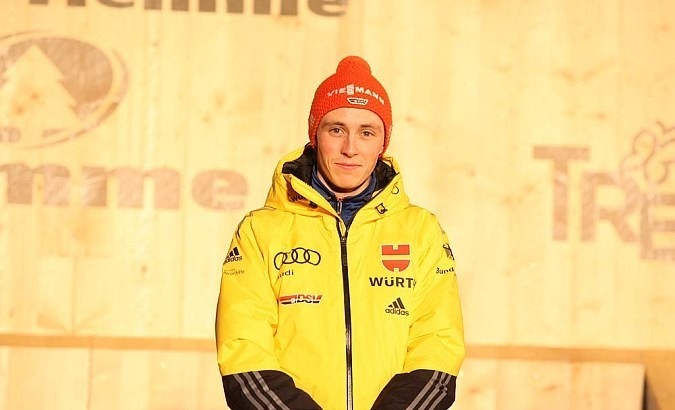 Dekoracja medalowa zawodów indywidualnych HS 134/10 km